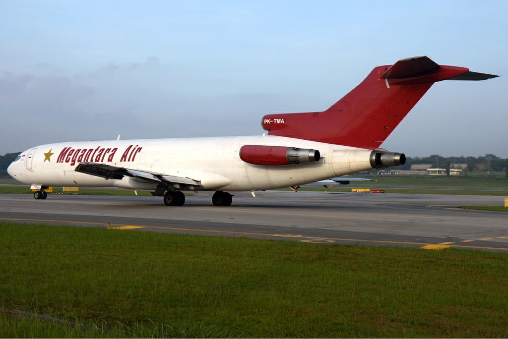 Megantara Air Boeing 727-247/Adv(F)